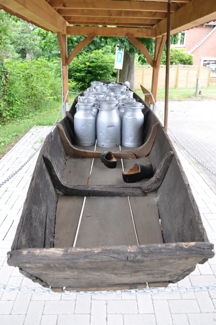 Bilder Ihlienworth 2012